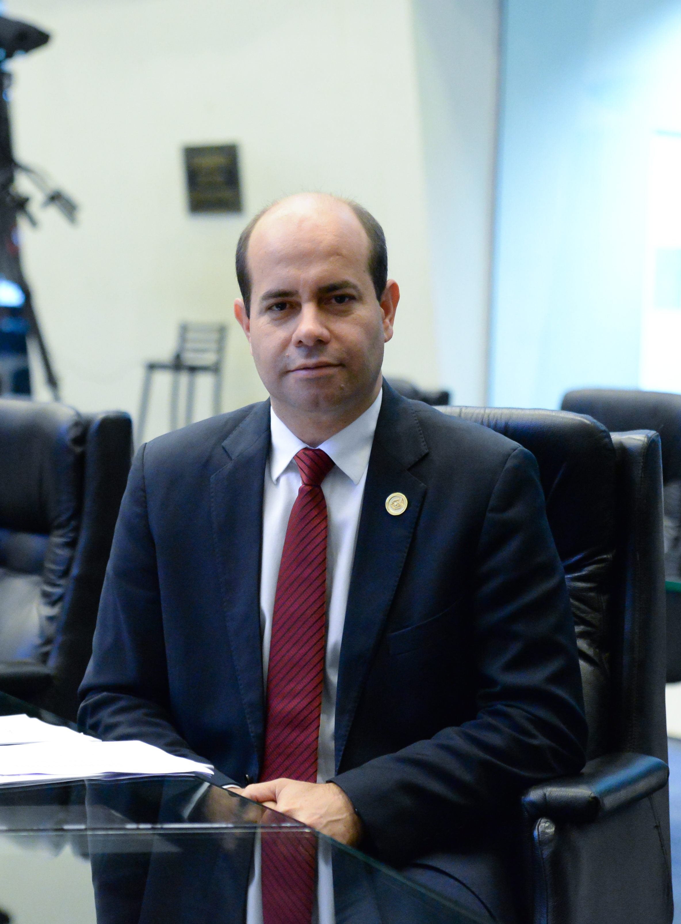 Evandro Araujo